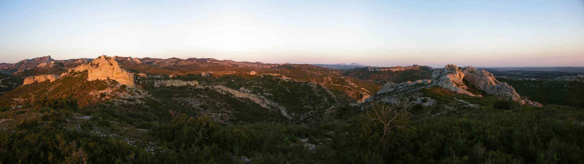 Les Alpilles